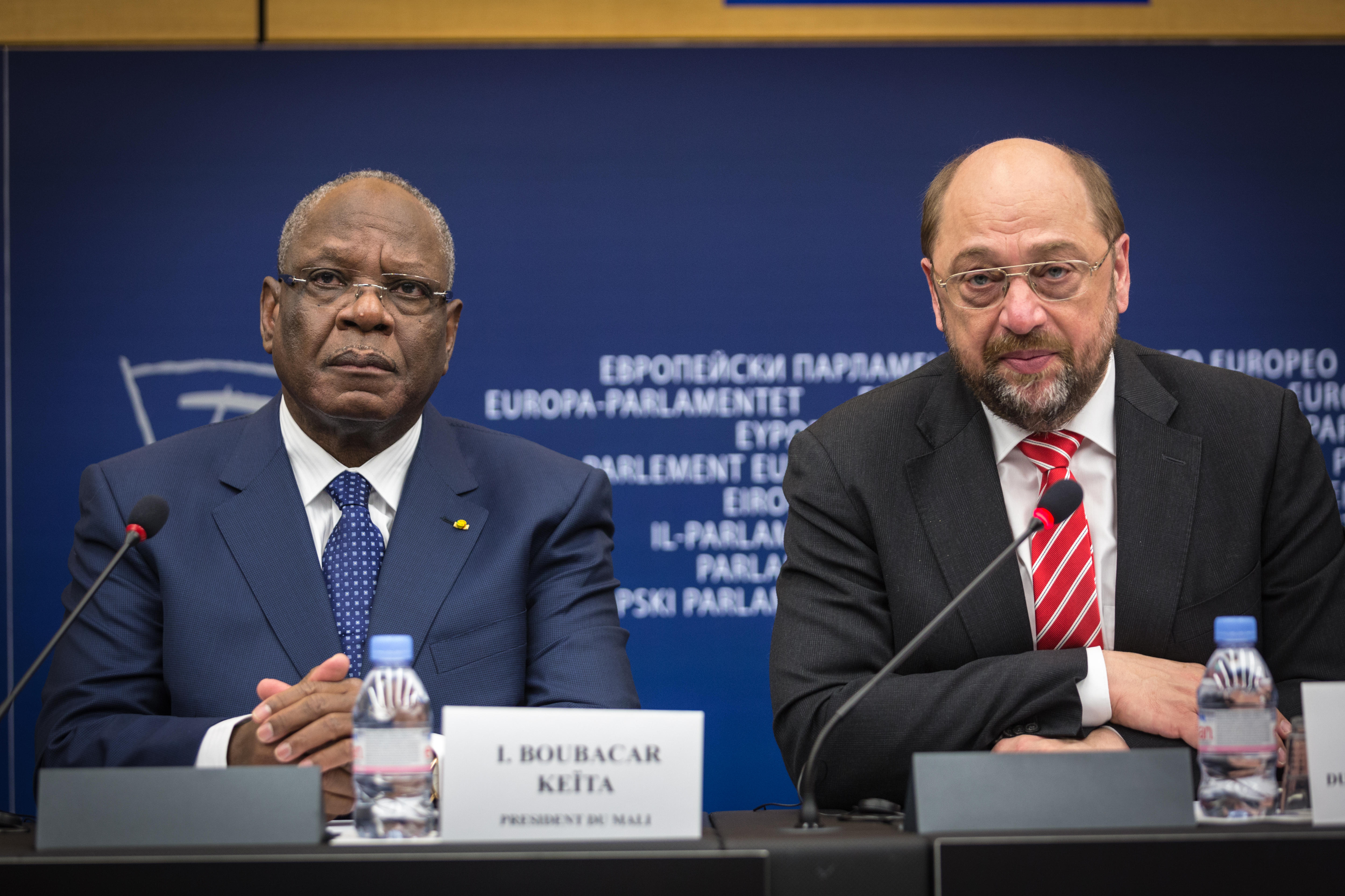 Le président de la République malienne, Ibrahim Boubacar Keïta et Martin Schulz au Parlement européen de Strasbourg le 10 décembre 2013.